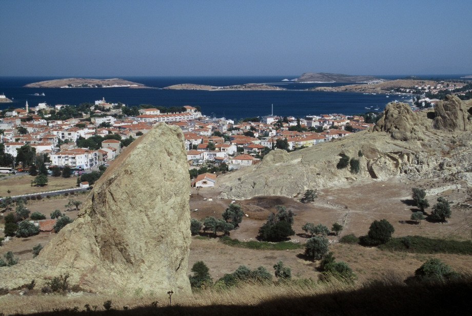 Eski Foça, Türkei, eigene Aufnahme